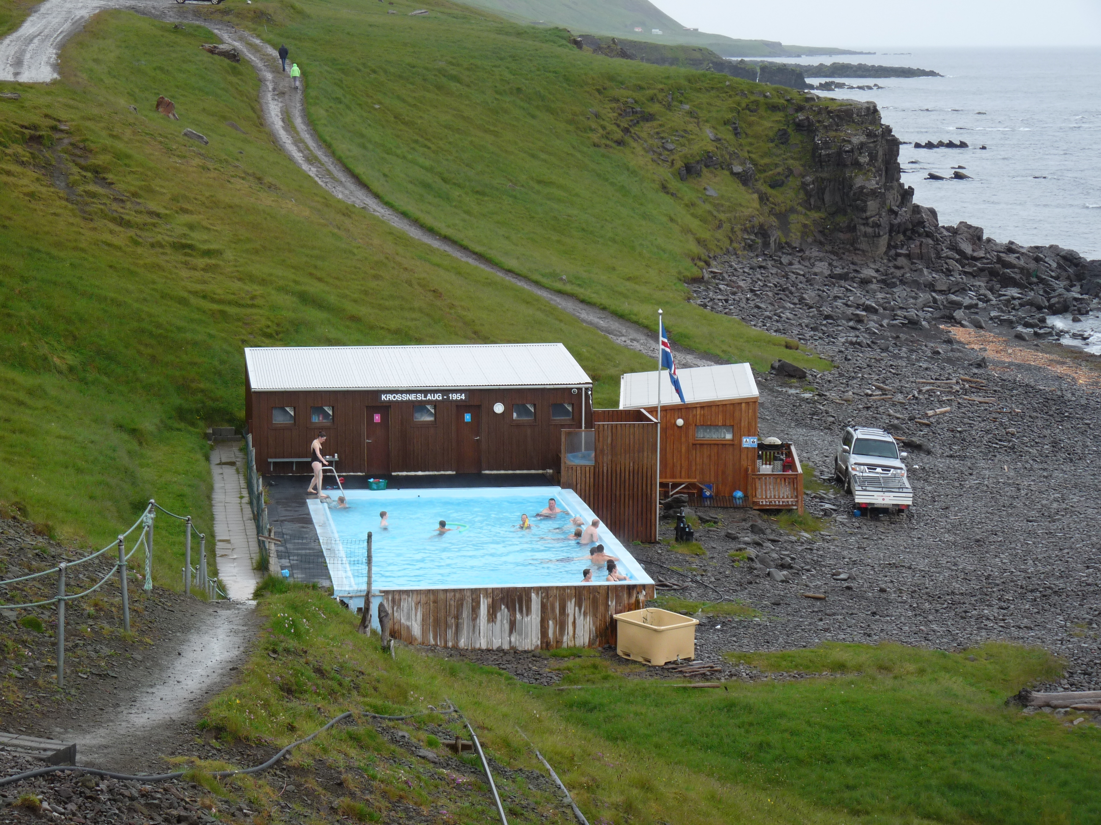 Zwembad en warm bad bij de warme bronnen aan zee.